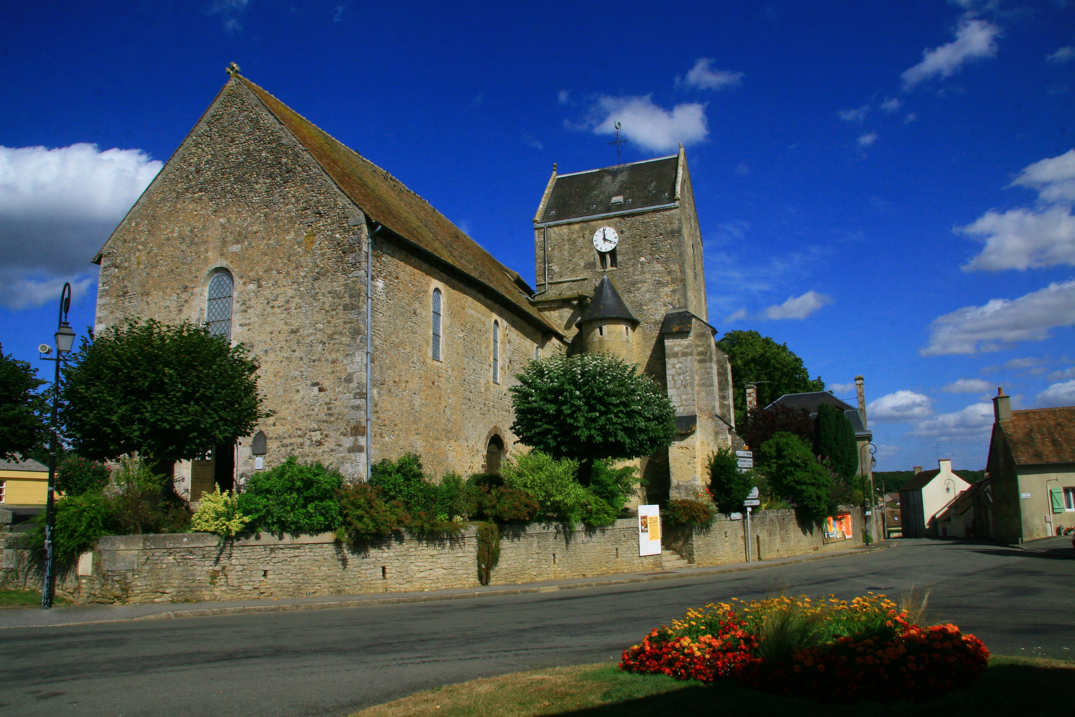 Centre de la commune d'Ancinnes